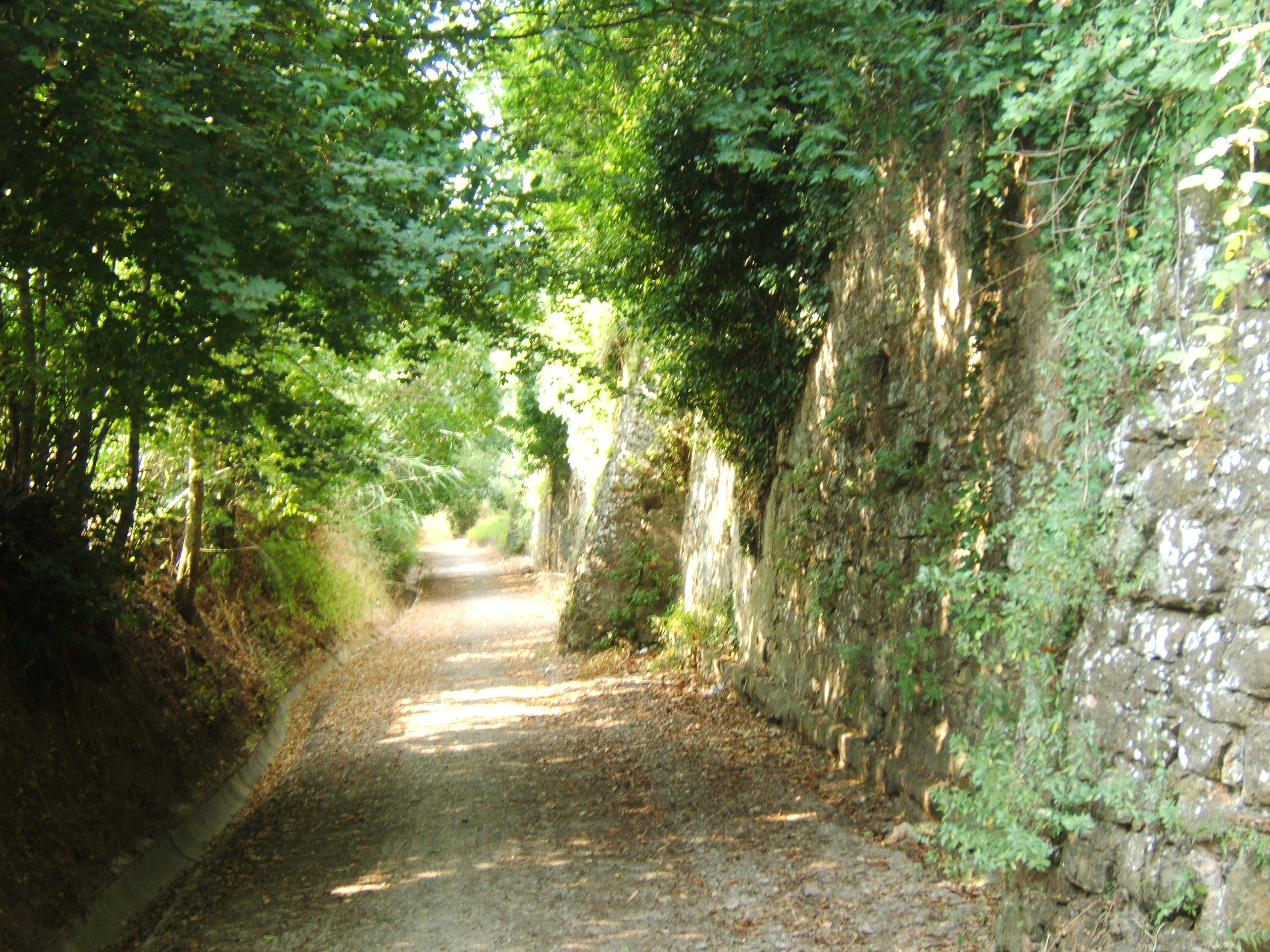 Mura del barghetto mediceo di Bonistallo a poggio a caiano - lato SO